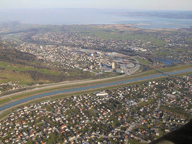 Luftbild von St. Margrethen (aus dem Heißluftballon)